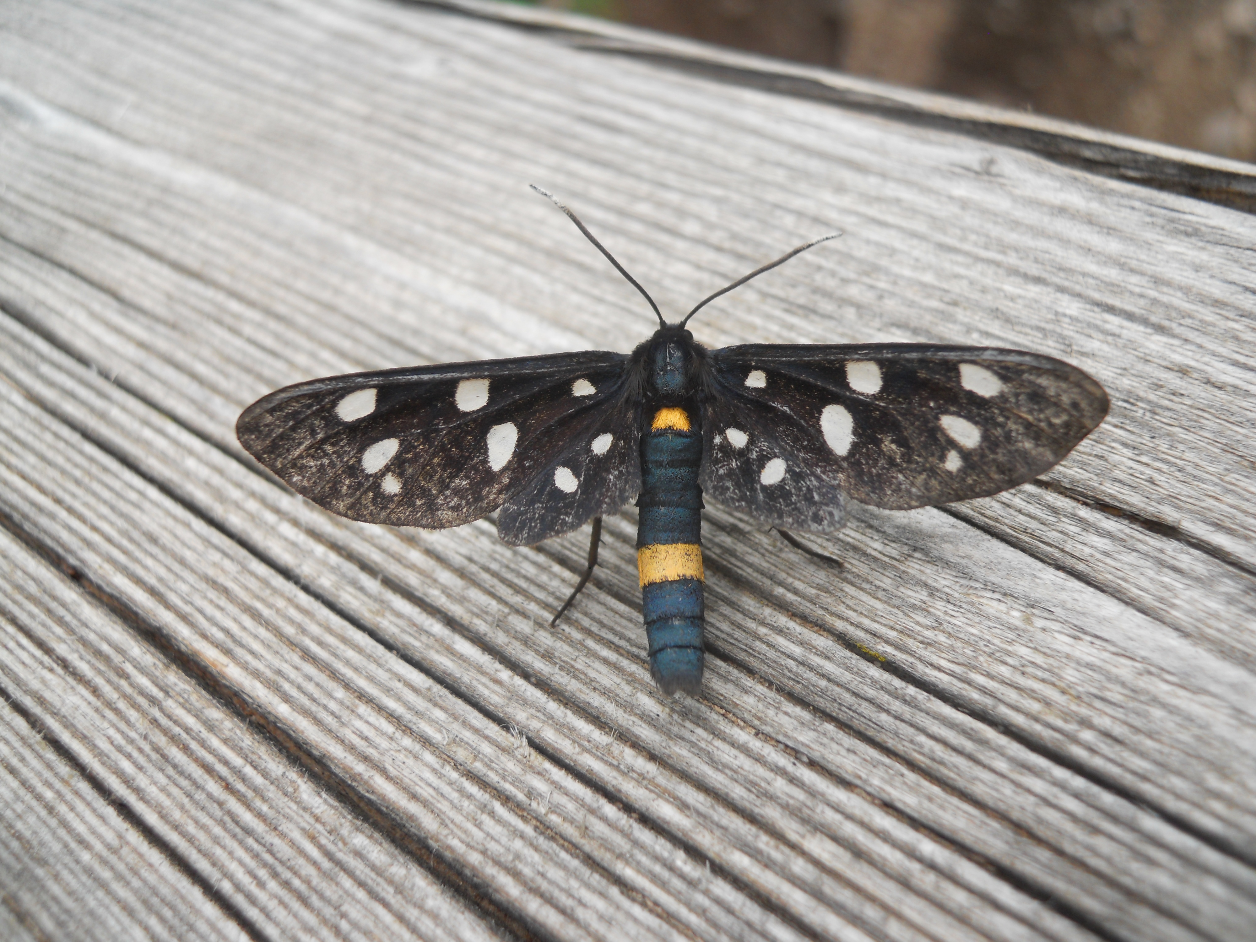 Una farfalla della specie Amata phegea fotografata alle Piramidi di Segonzano